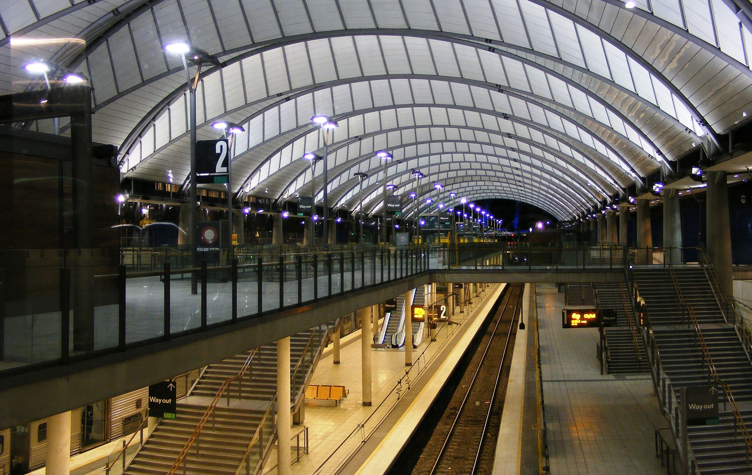 OLYMPIC TRAIN STATION SYDNEY